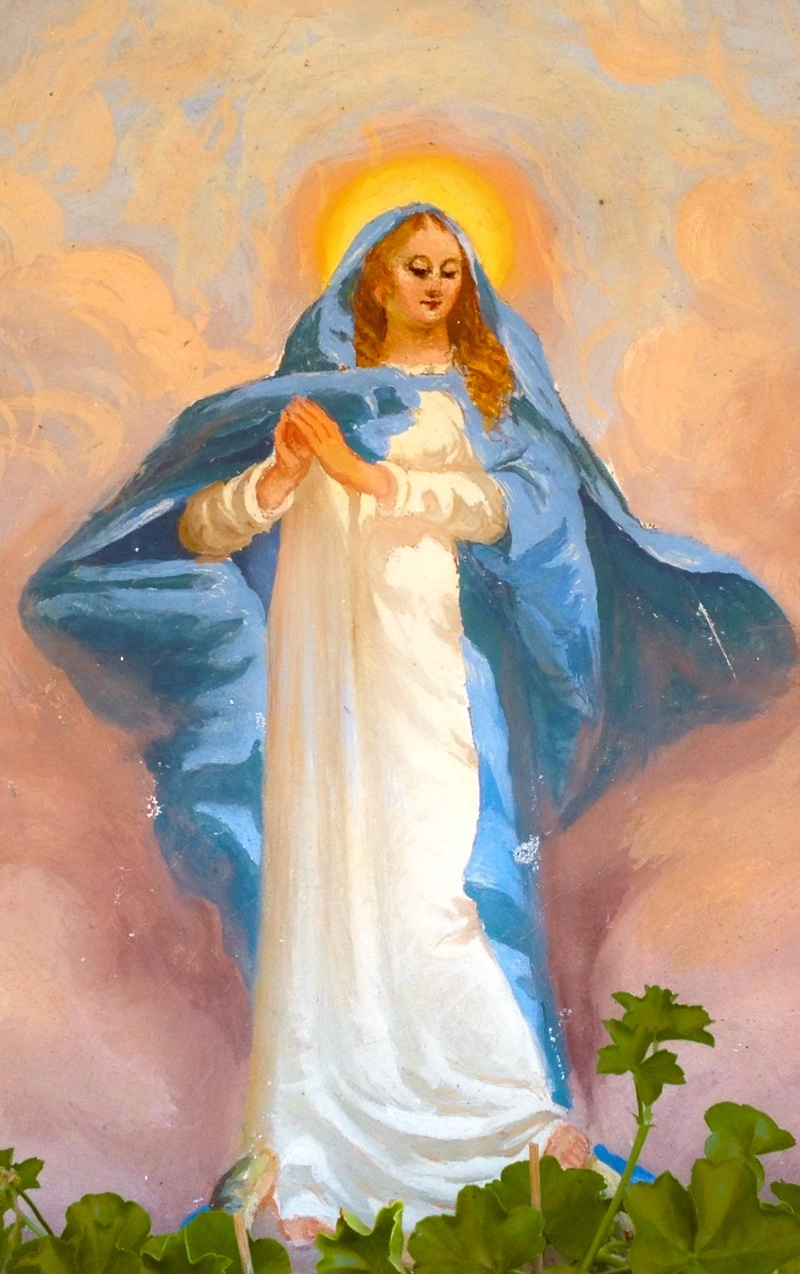 Madonna in Someo, Valle Maggia